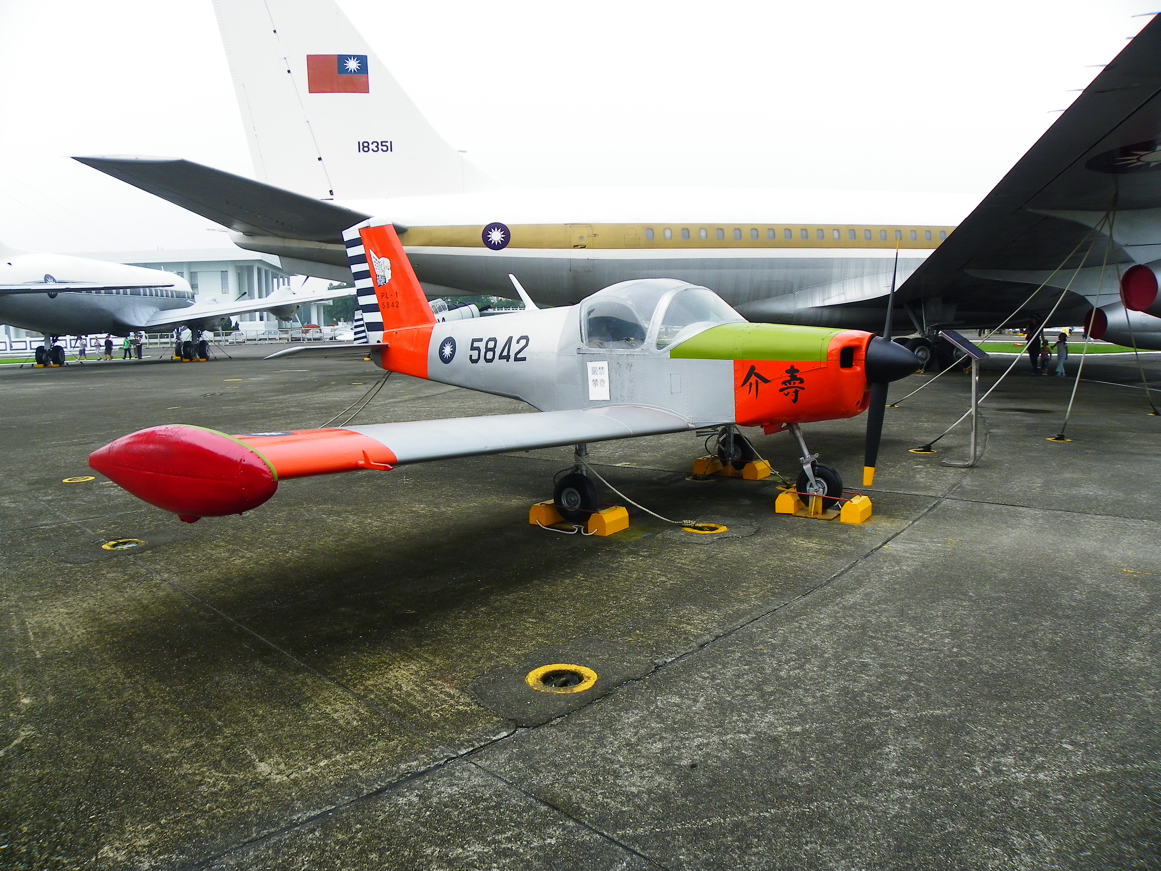 中華民國空軍官校軍機展示場保存的介壽號初級教練機，攝於2011年岡山空軍基地營區開放日。